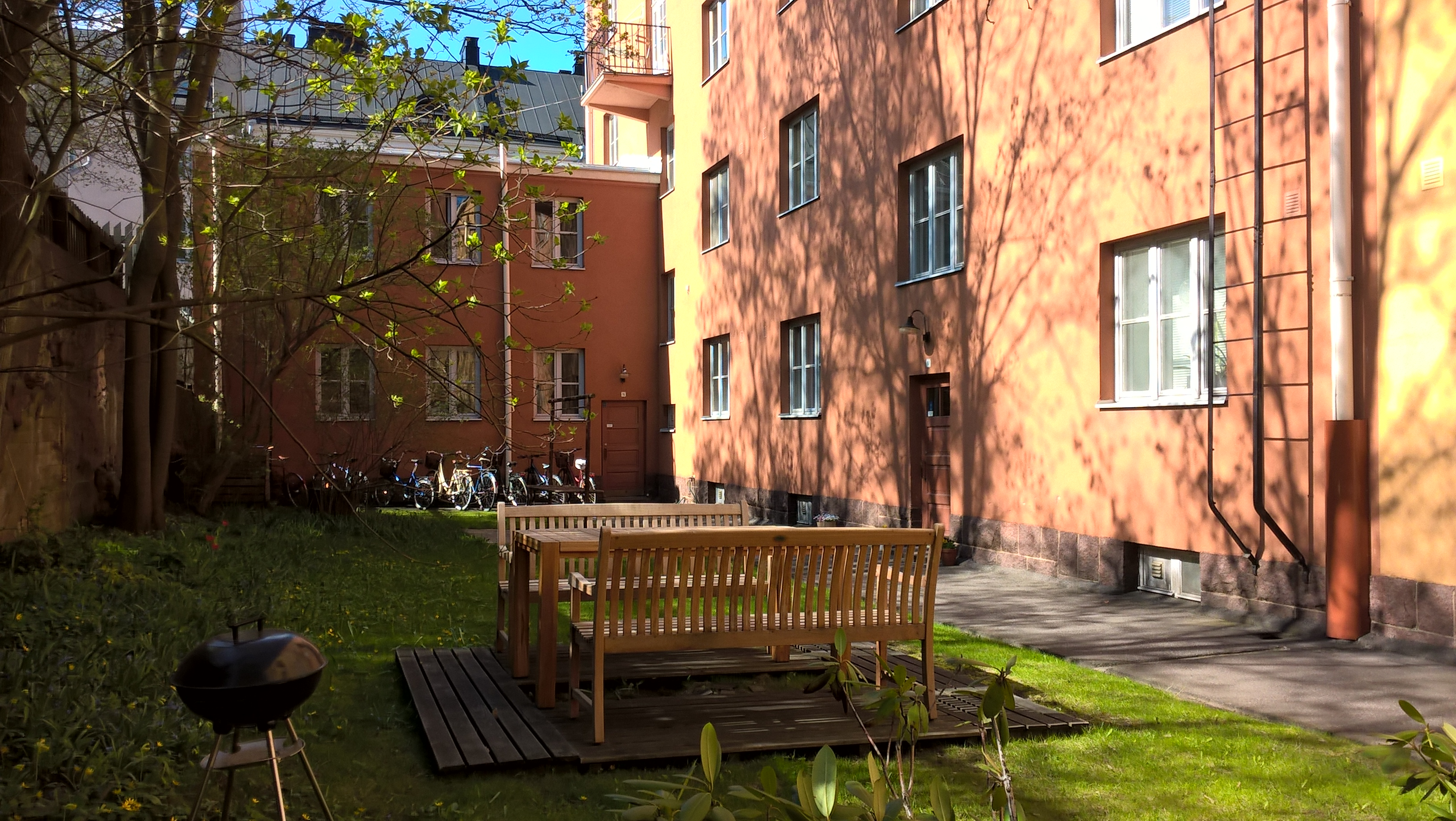 Näkymä Martti Välikankaan suunnitteleman As. Oy Hauhon sisäpihalta.